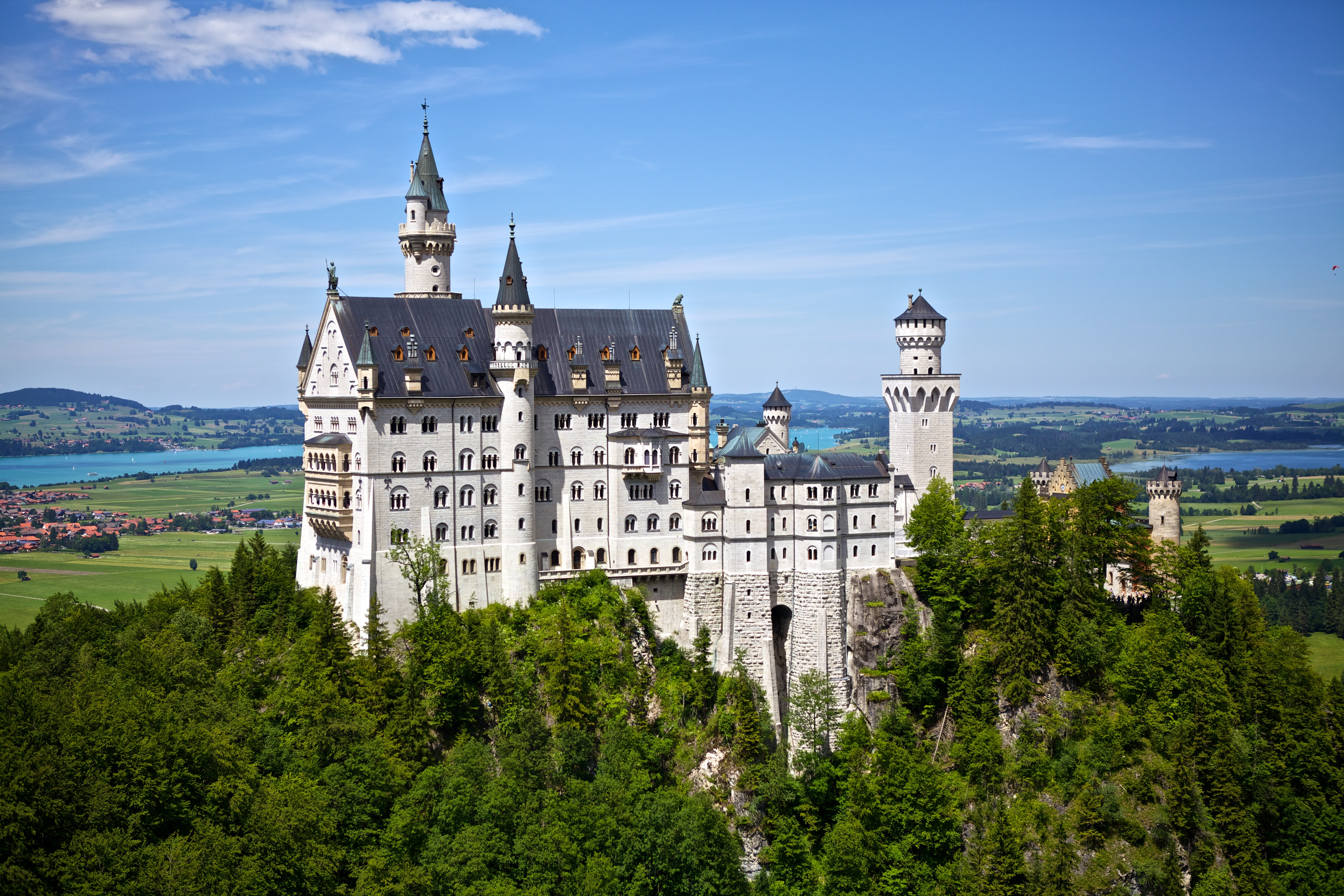 Neuschwanstein Castle